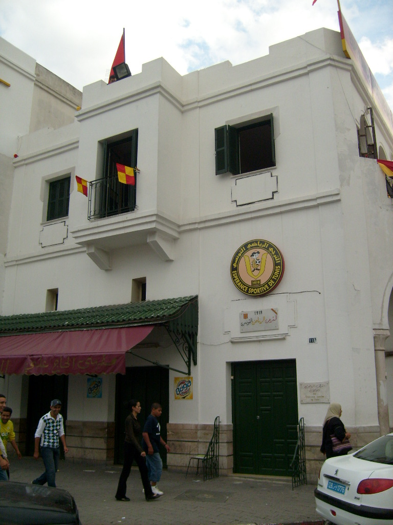 Siège de l'Espérance sportive de Tunis dans le quartier de Bab Souika